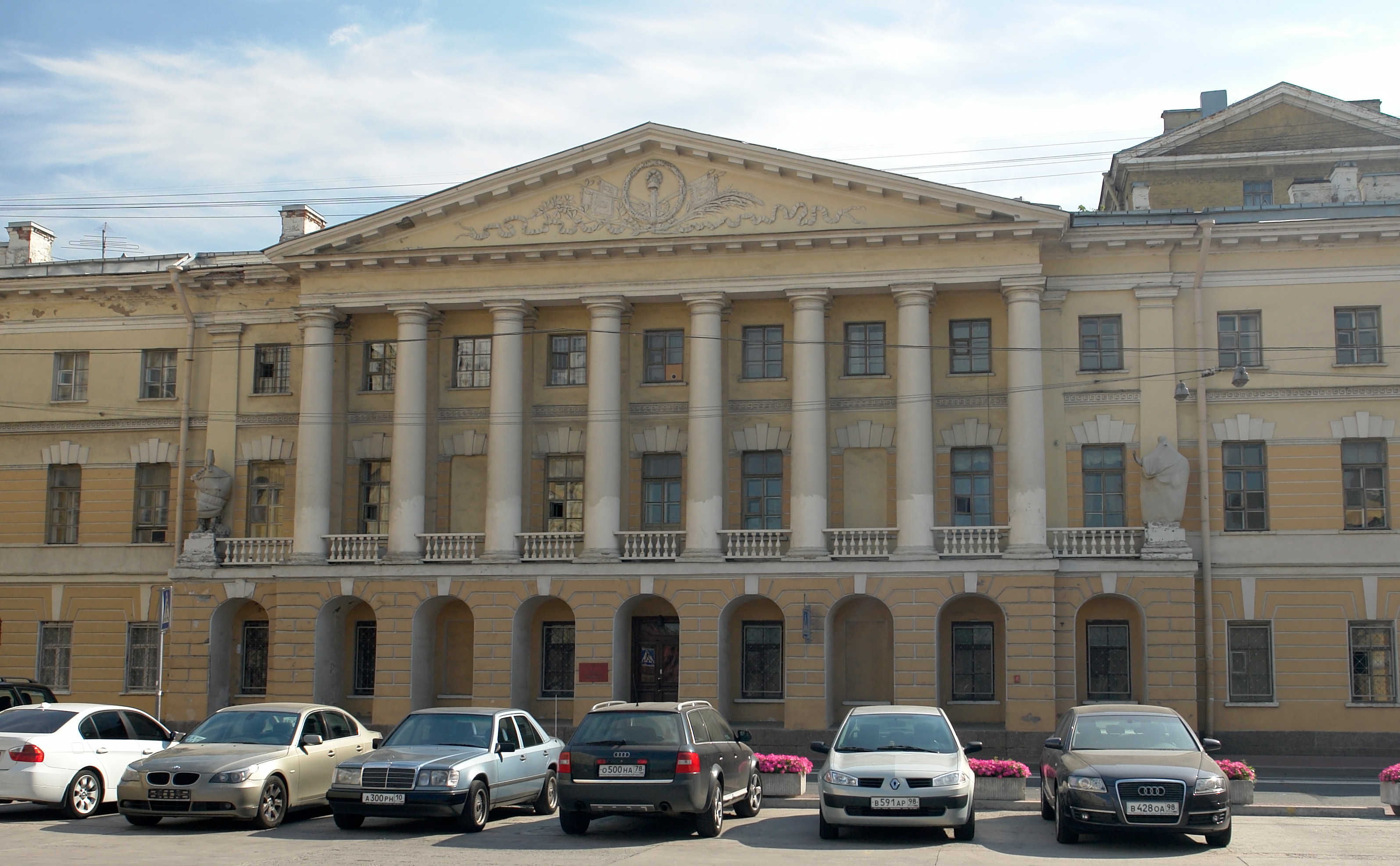 Здание ЛГУ - бывший офицерский корпус Кавалергардского полка (Шпалерная, 41, Санкт-Петербург); арх. Луиджи Руска (1800—1806)